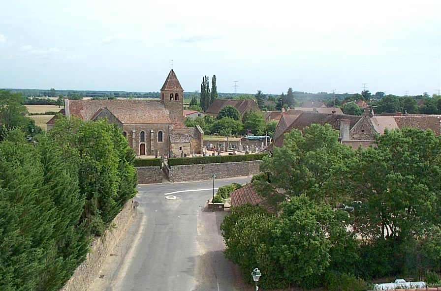 La Chapelle de Bragny, vue sur l'église